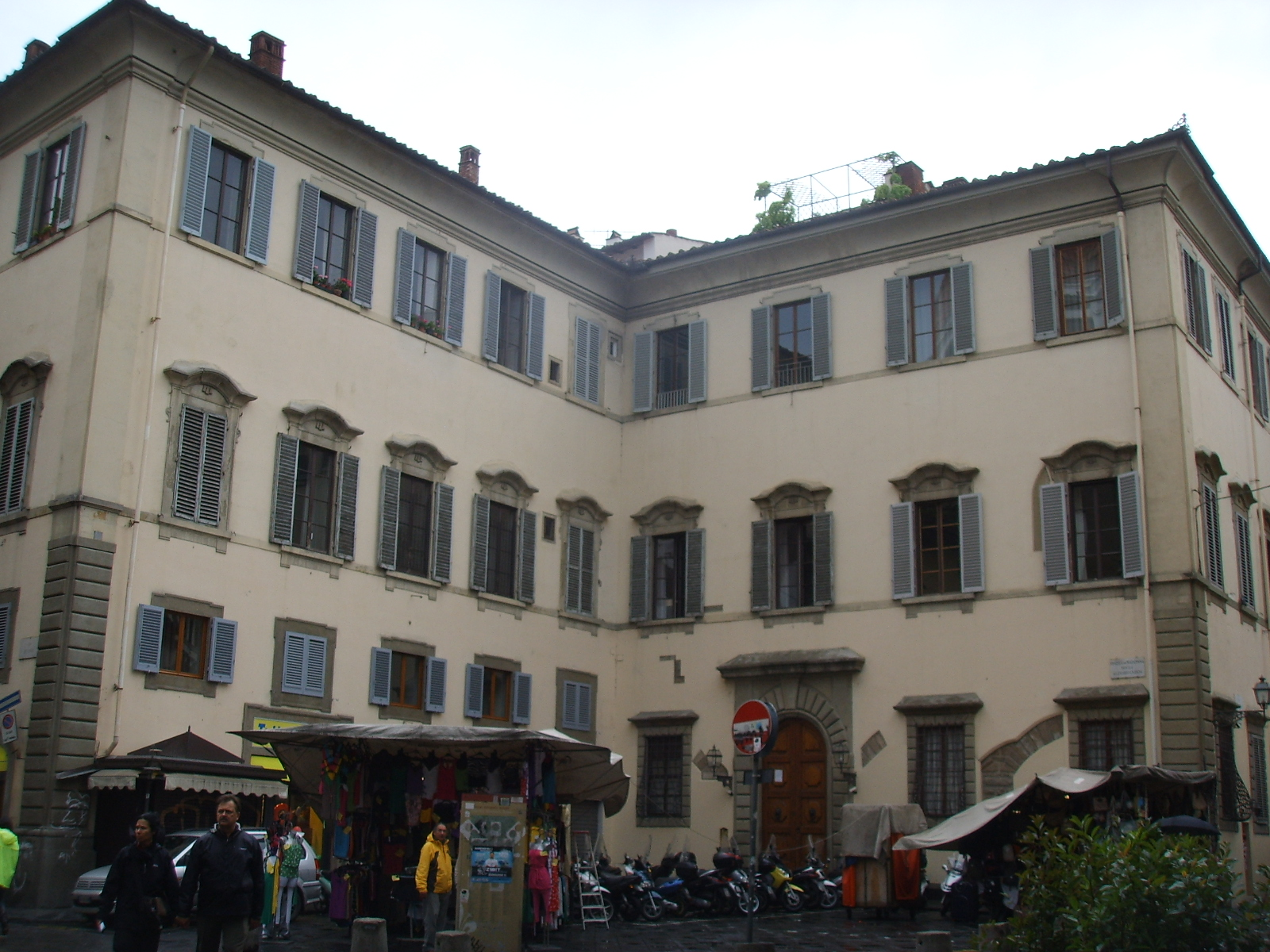 Palazzo aldobrandini 11